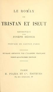 Leromandetristan00bduoft